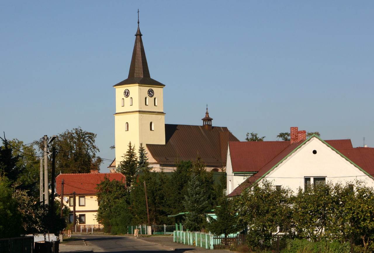 Gościęcin, ul. Szkolna 4 - rzymskokatolicki kościół pararafialny p.w. Wniebowzięcia NMP, poł. XVII, 1825.